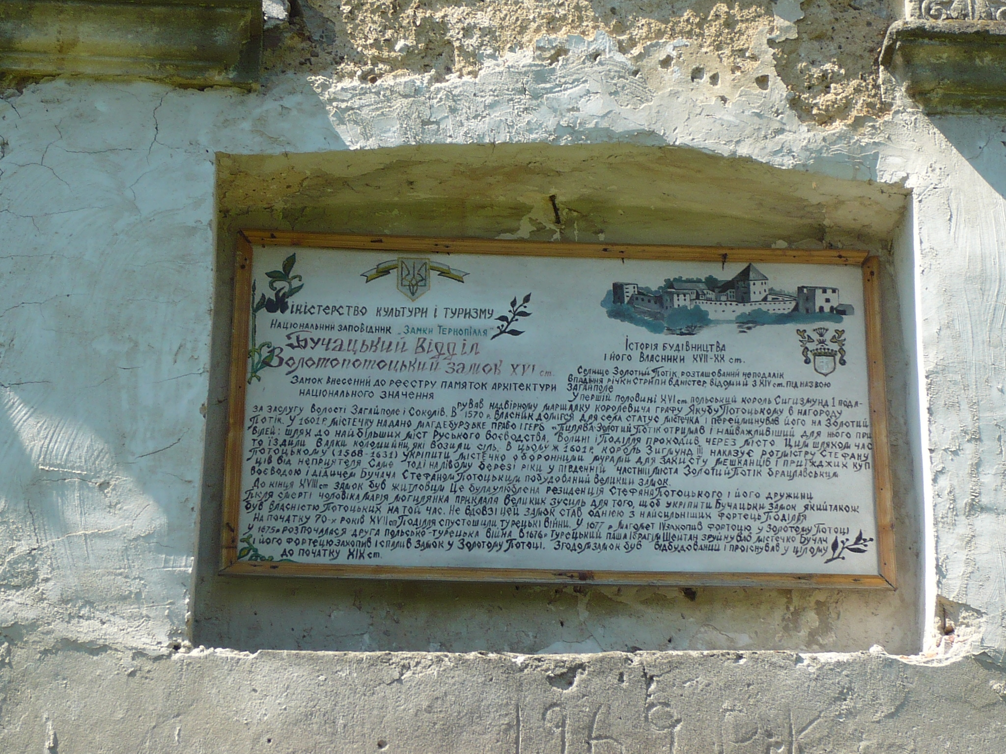 Potok Złoty. Zamek